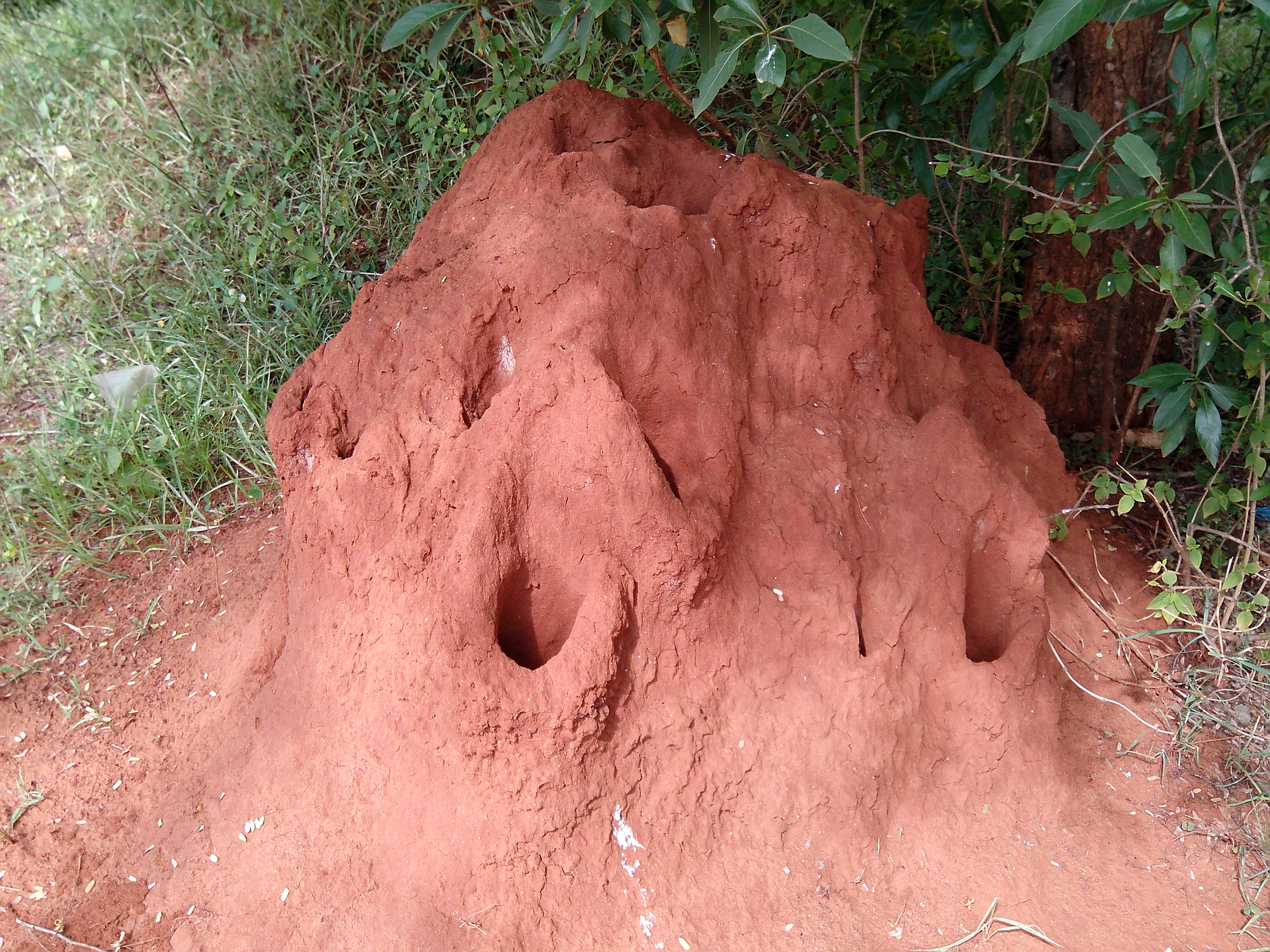 சேலத்தில் காணப்படும் கரையான் புற்றுகள்.